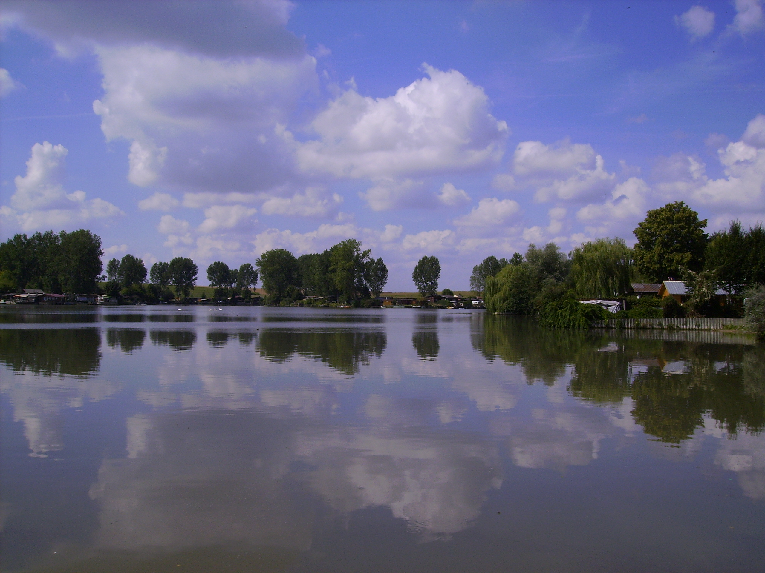 Lac de la Tensch en Lorraine